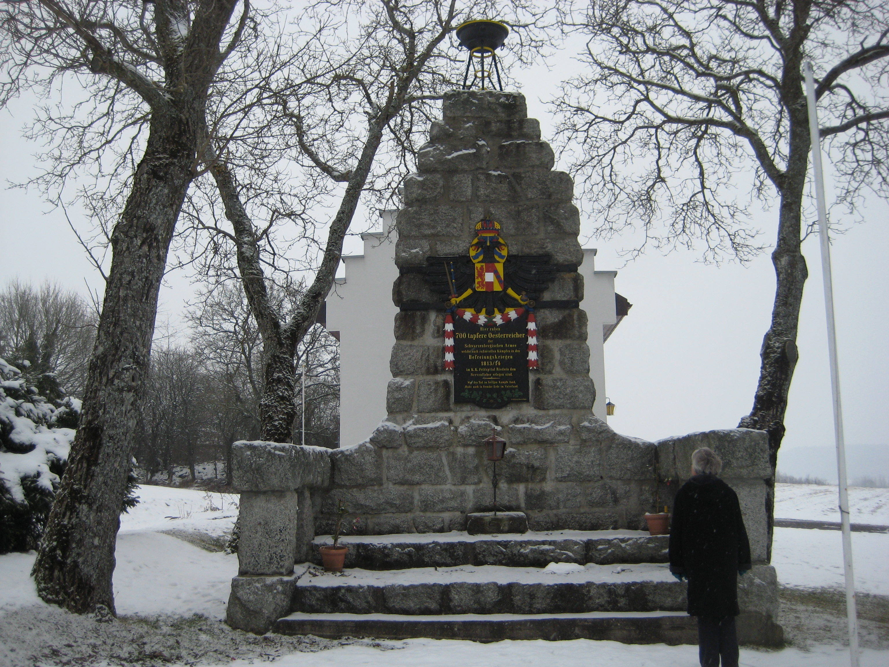 Riedern am Wald, Denkmal Im Jahre 1813 und 1814 starben insgesamt 700 österreichische Soldaten der Schwarzenbergischen Armee in den Räumlichkeiten des ehemaligen Frauenklosters, das als Feldspital eingerichtet worden war, an Nervenfieber. An dieses tragische Ereignis erinnern heute ein Denkmal und die Mitte 2008 fertiggestellte Friedenslichtkapelle.